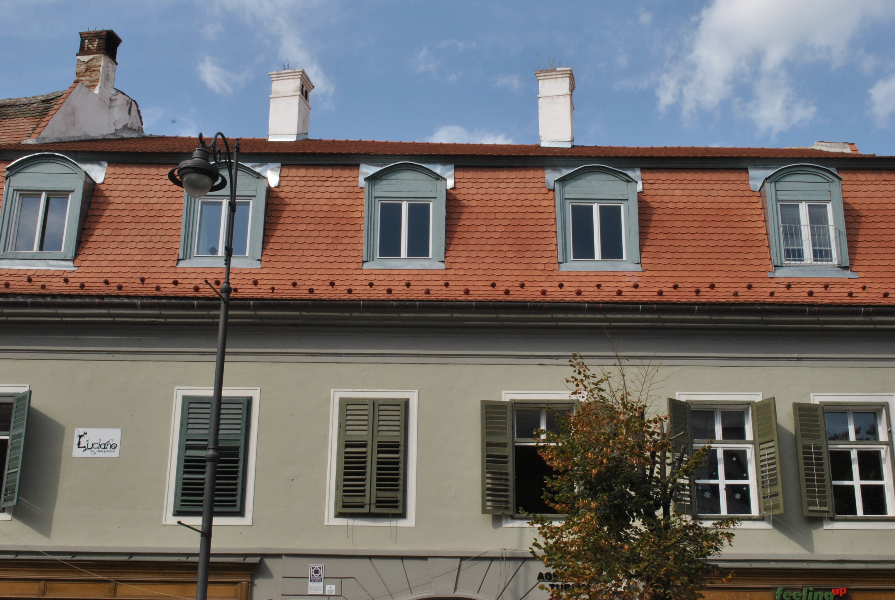 Casa Michael Brukenthal, azi locuințe șispațiu comercial, sec. XV,1786 -1790